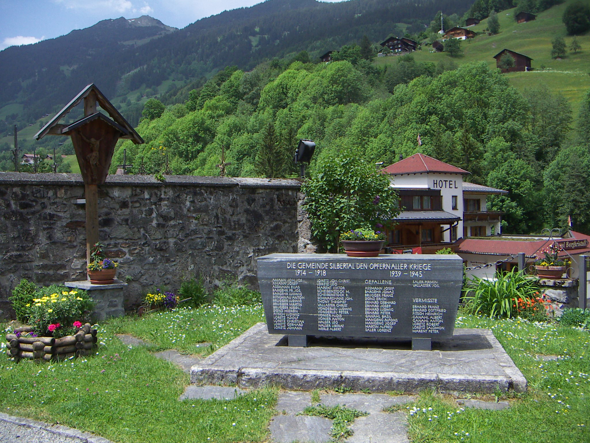 Ehemaliges Kriegerdenkmal Silbertal bis Juni 2009.